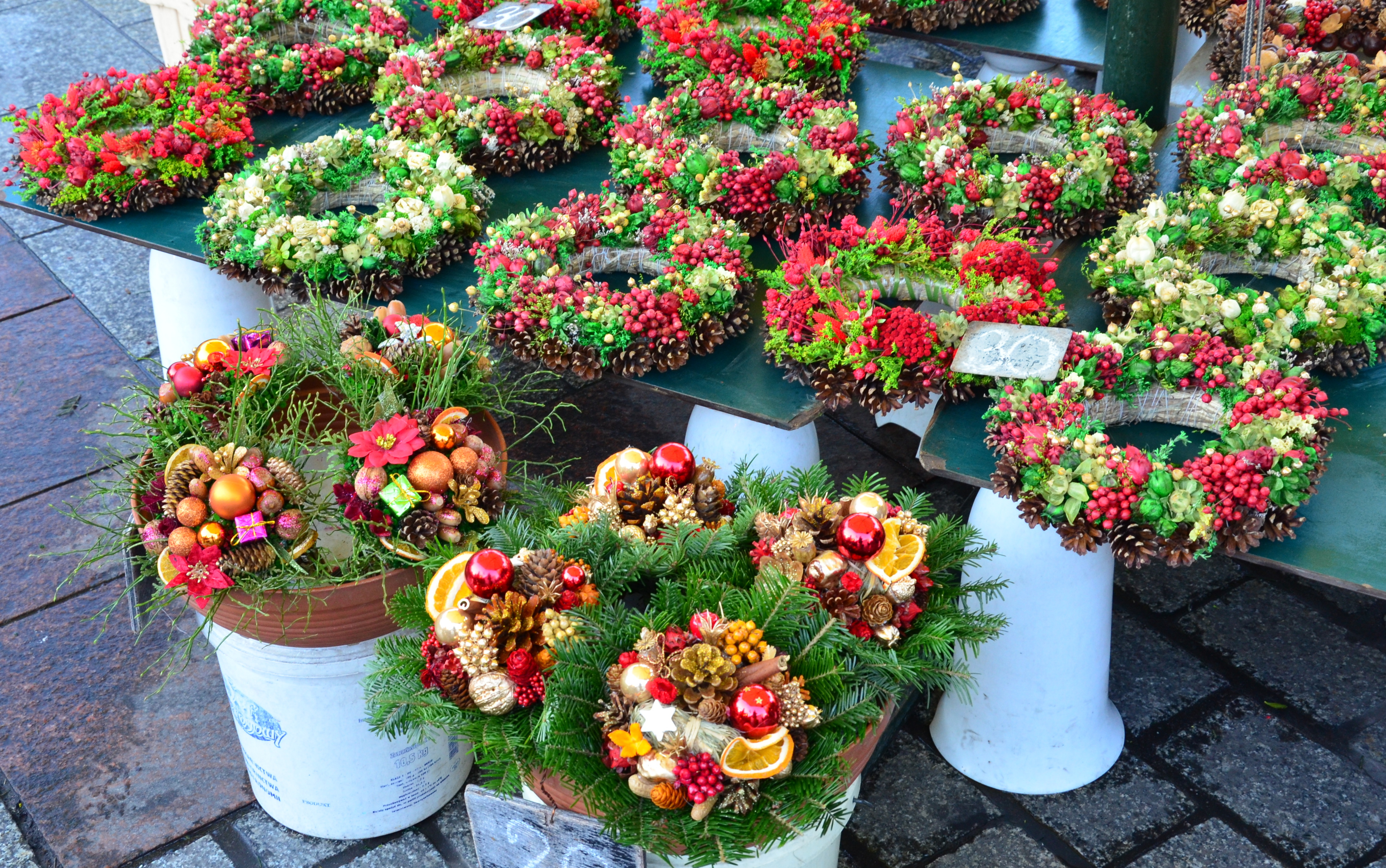 Adventskranze